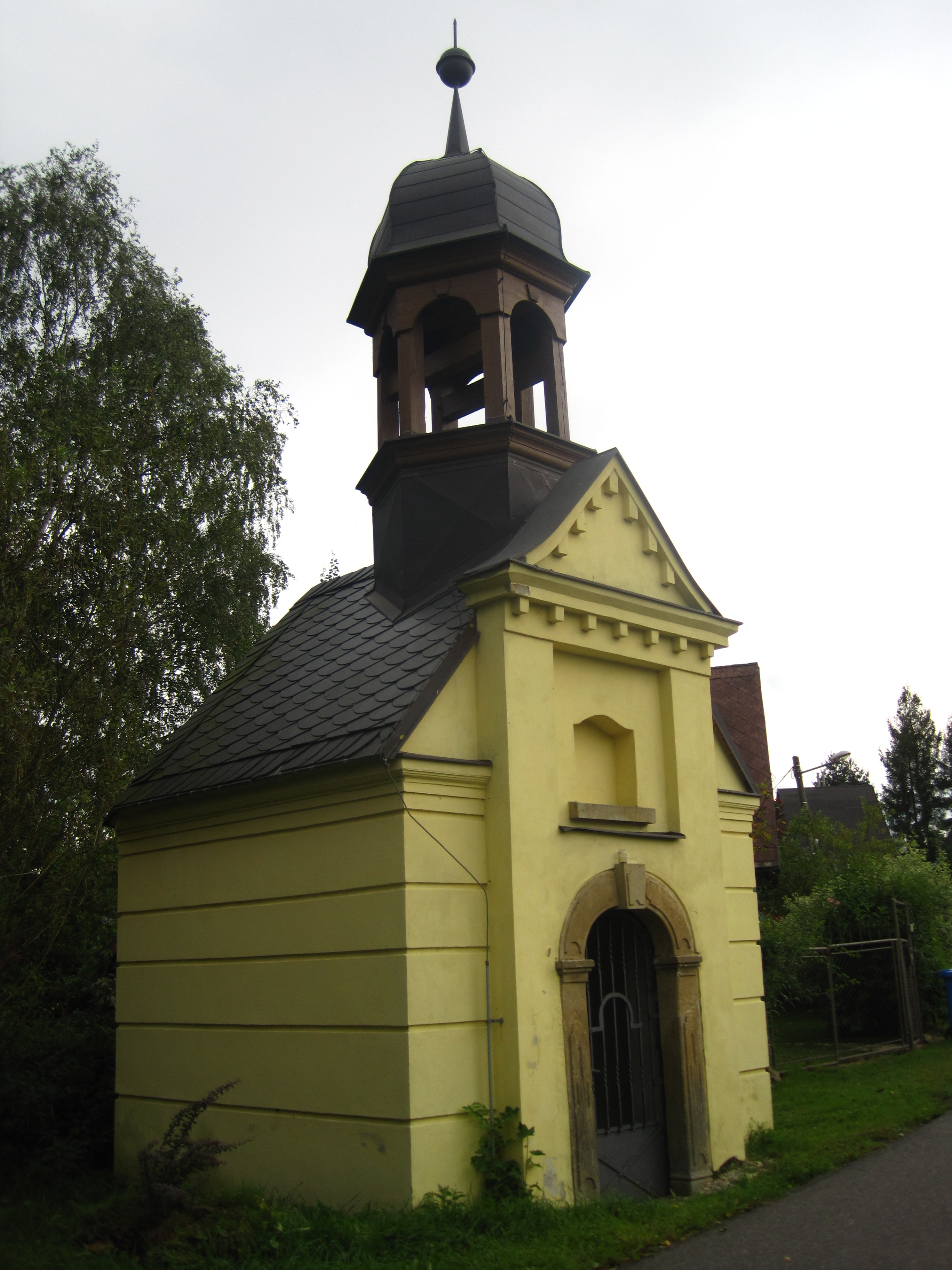 Kaplička, Bedřichovka, u rybníčku při dnešní zahrádkářské kolonii, Liberec.